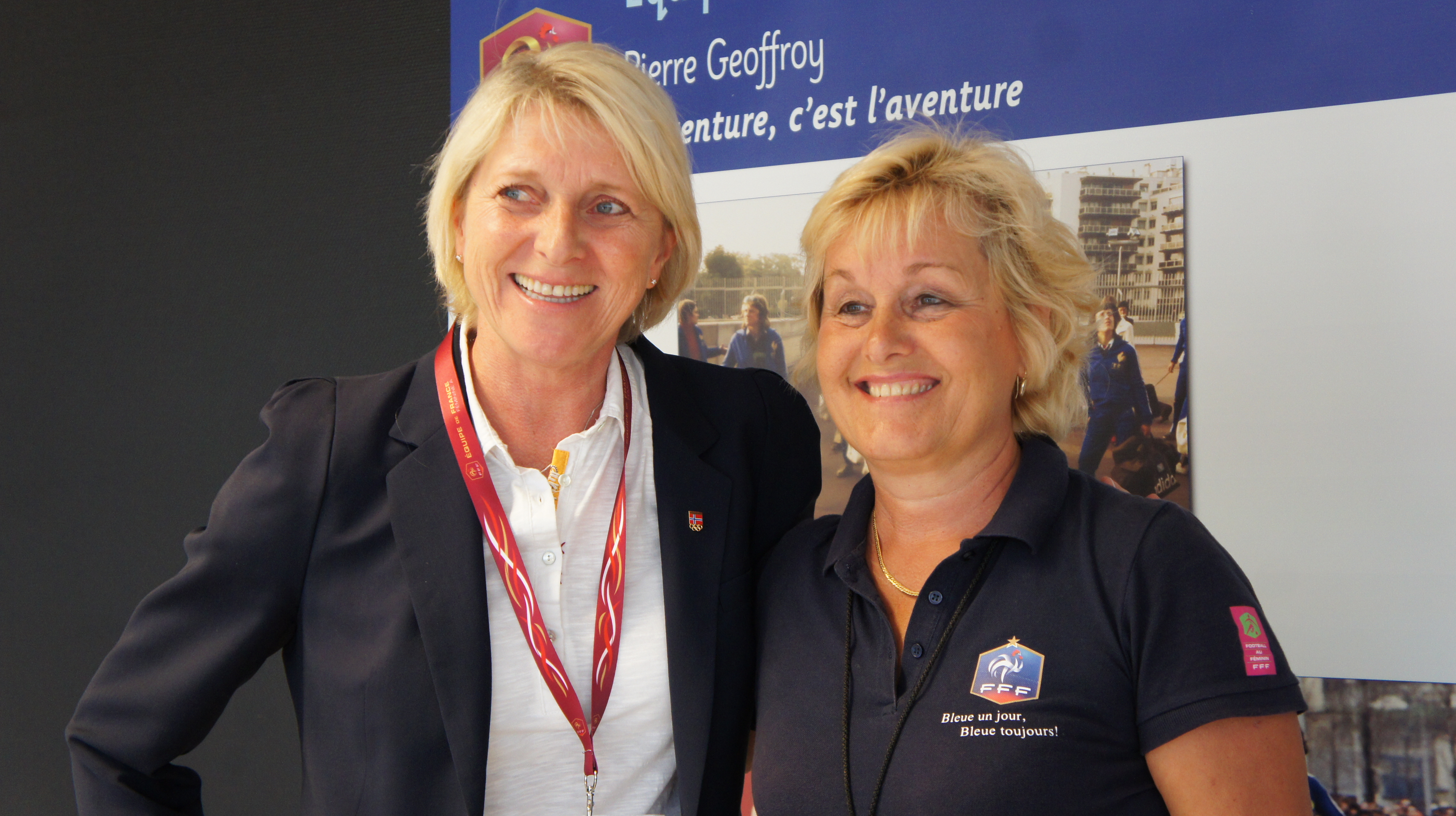 Marit Breivik et une ancienne joueuse de l'équipe de France de football.